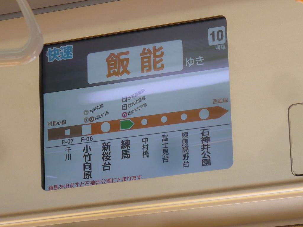 東京メトロ10000系LCDモニタ